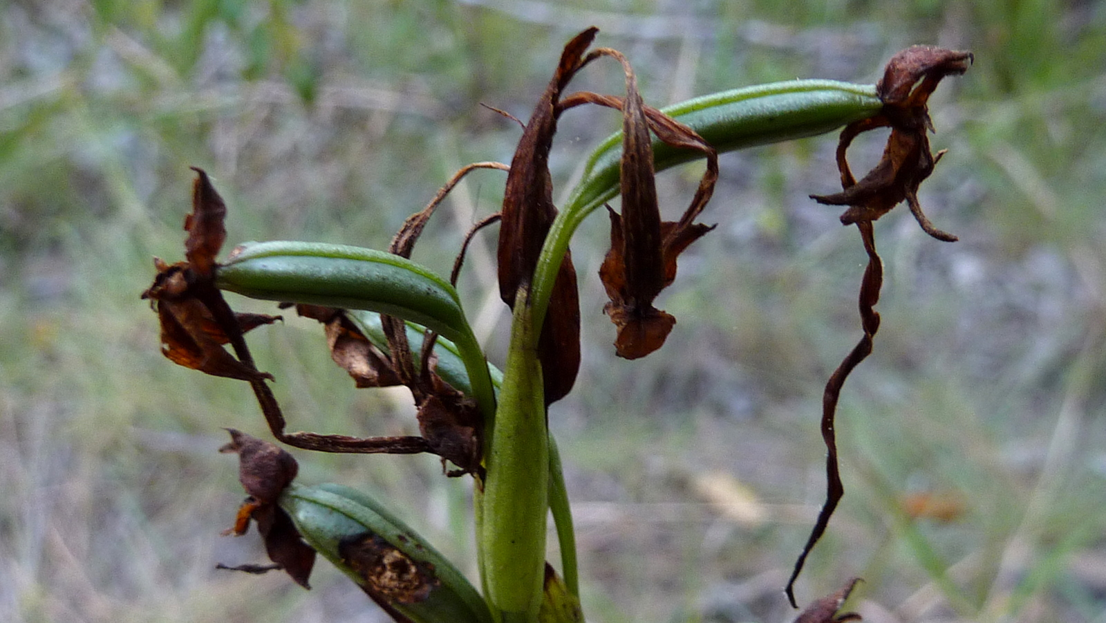 Habenaria rodeiensis Barb.Rodr.